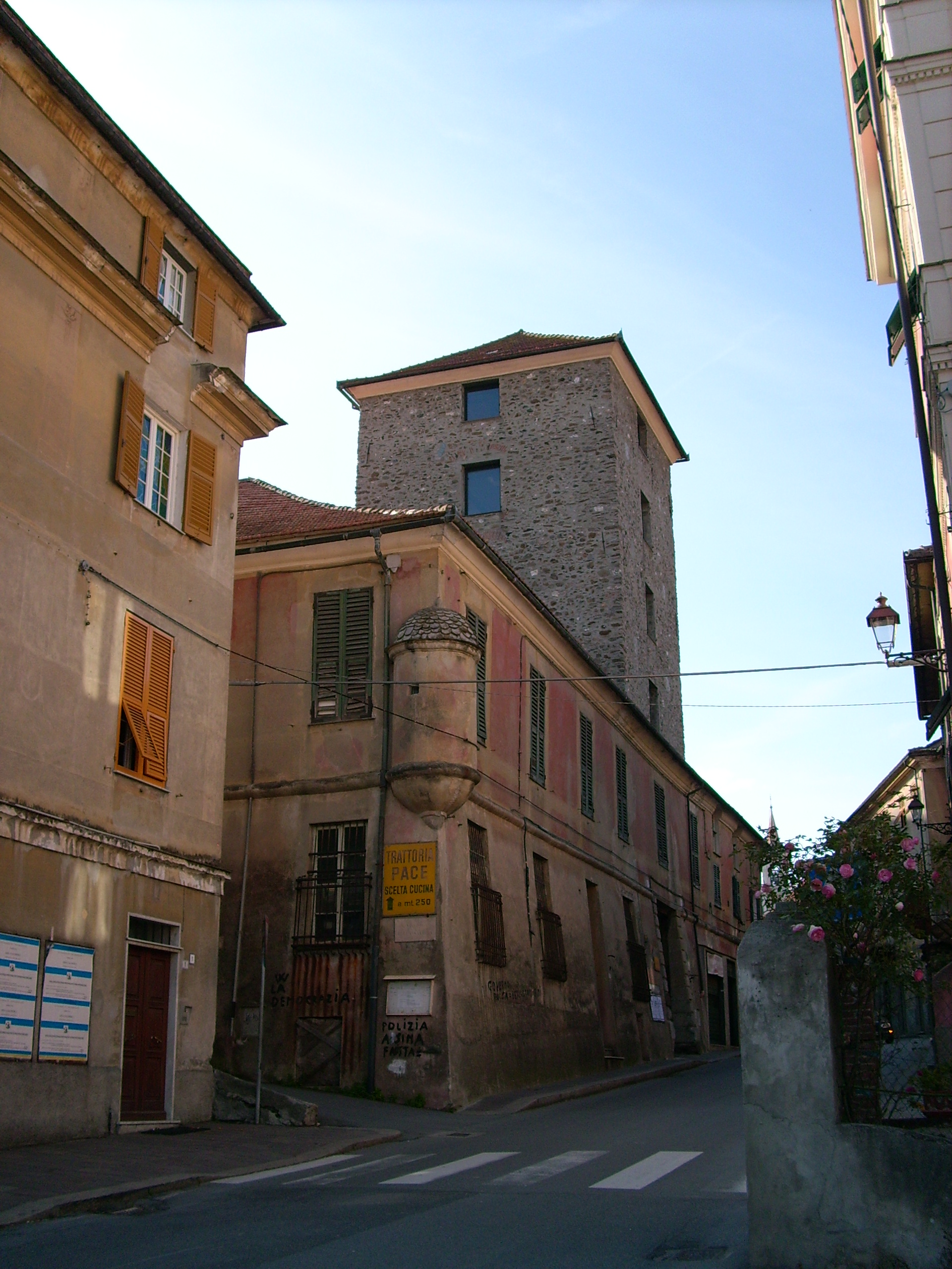 La Saliera di Campomorone, Liguria, Italia